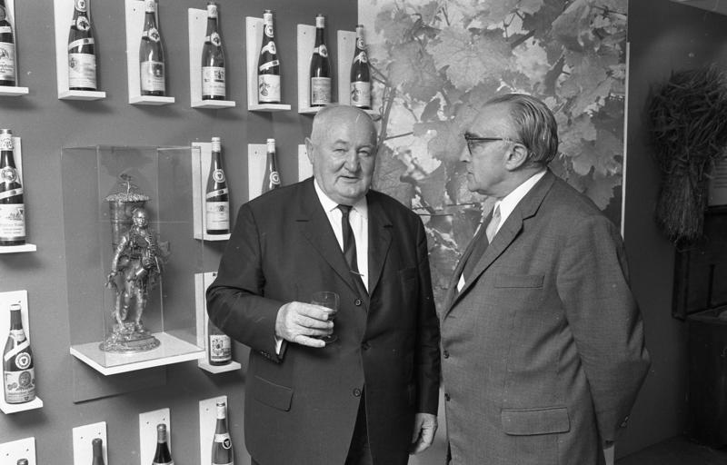 Empfang der Landesvertretung Baden-Württemberg (anläßlich der Ausstellungseröffnung "Land der Sonderkulturen") (links: Min. Eugen Leibfried, rechts: Min. Seifritz)